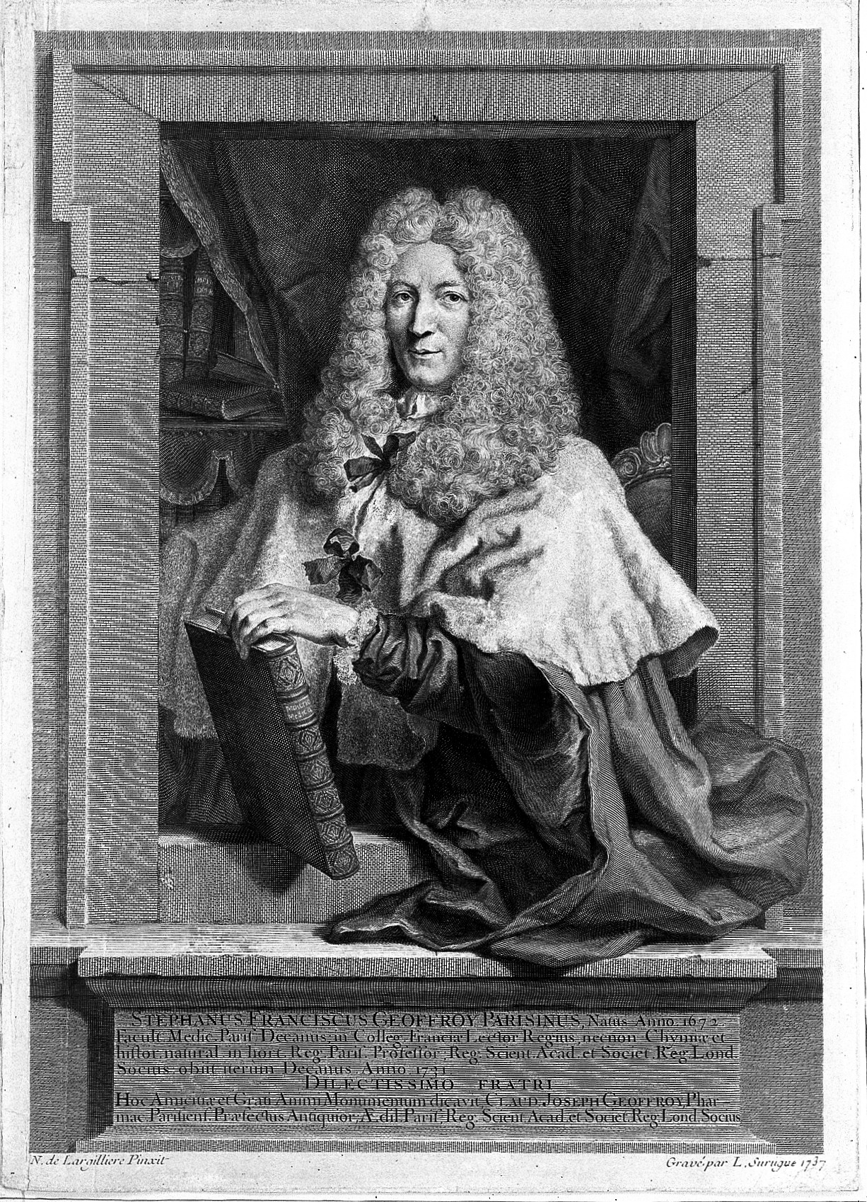 Etienne François Geoffroy. Line engraving by L. Surugue, 1737, after N. de Largillière. Iconographic Collections Keywords: Étienne-Francois Geoffroy